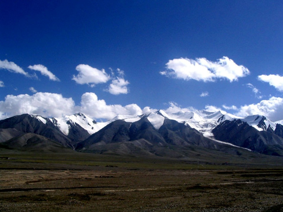 Cordillère du Kunlun par l'Alliance française de Wuhan (